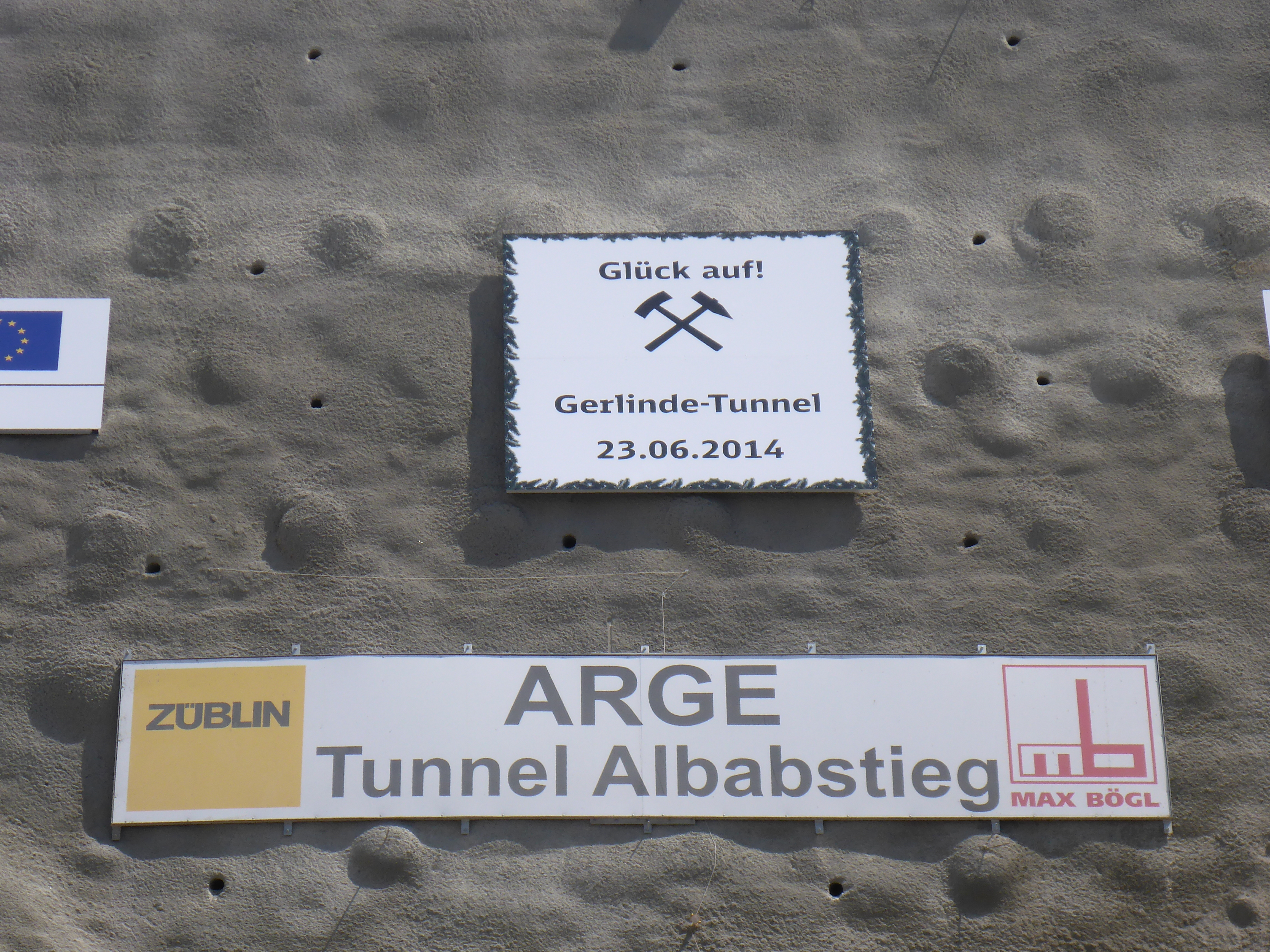 Bautafel am Portal Dornstadt des Albabstiegstunnel.